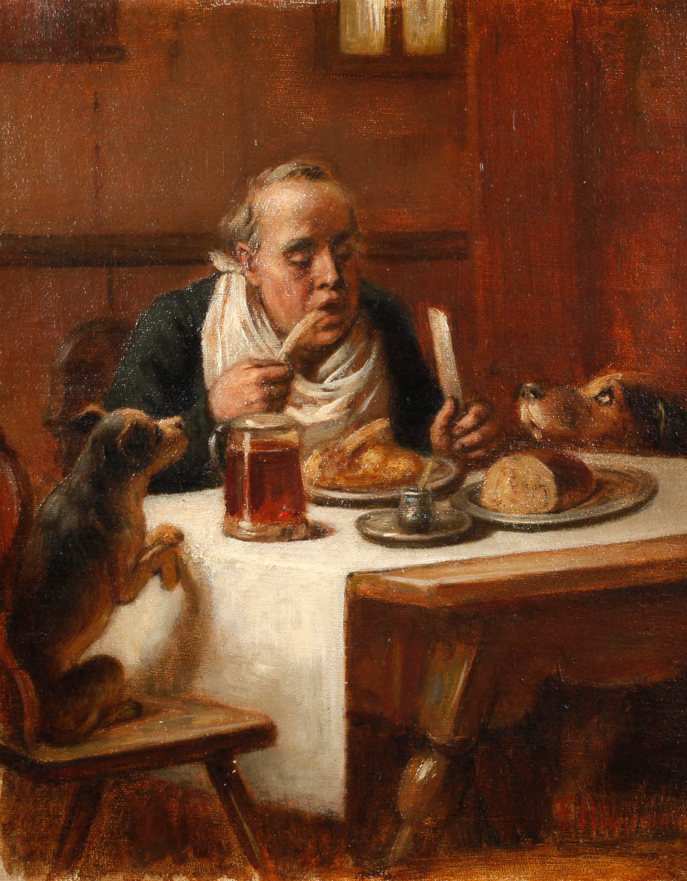 Friedrich Peter Hiddemann: Die Hundemahlzeit. Öl auf Leinwand, zweite Hälfte 19. Jh., 32 x 26,5 cm